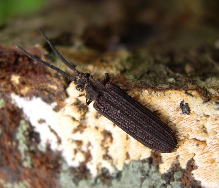 Tenomerga mucida (Chevrolat, 1829) (Coleoptera: Cupedidae) - female. Loc: Yokohama, kanagawa, japan. ja: ナガヒラタムシ（鞘翅目: ナガヒラタムシ科）のメス。横浜市内。産卵管をさかんに出し入れし、朽木の割れ目に挿し込もうとしていたことから、産卵に来ていたものと思われる。